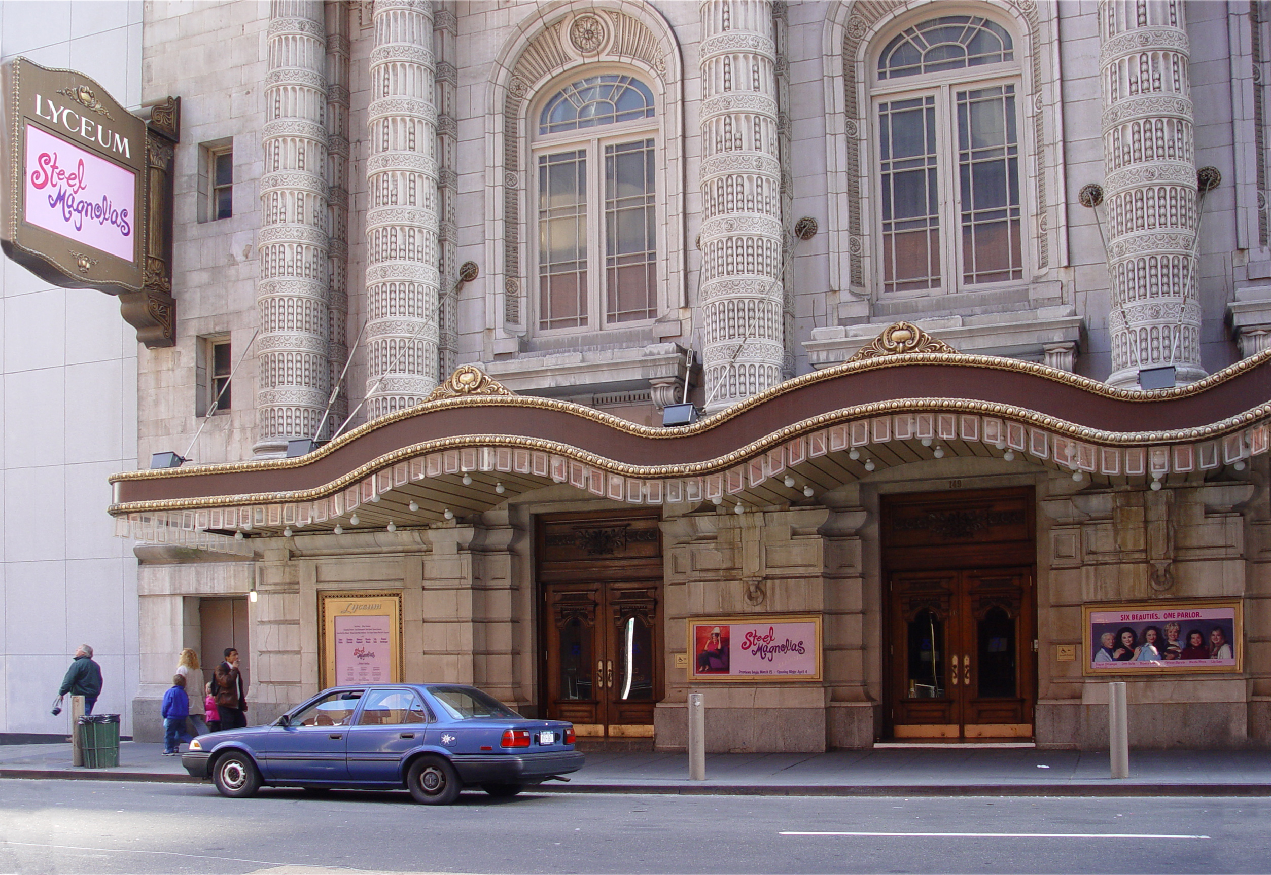 Fotografiert von Martin Dürrschnabel Lyceum in New York City.